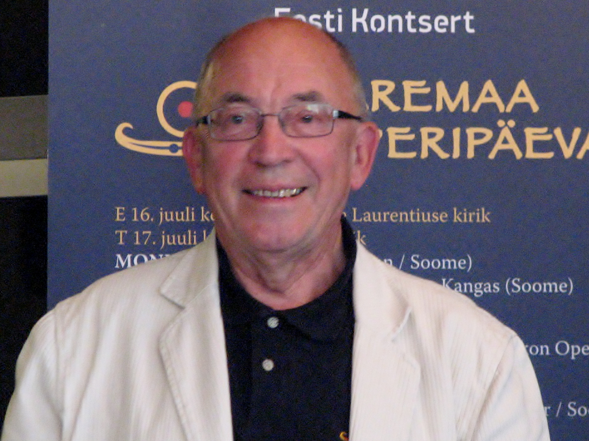 Saaremaa Ooperipäevade kunstiline juht Arne Mikk autogrammitunnis